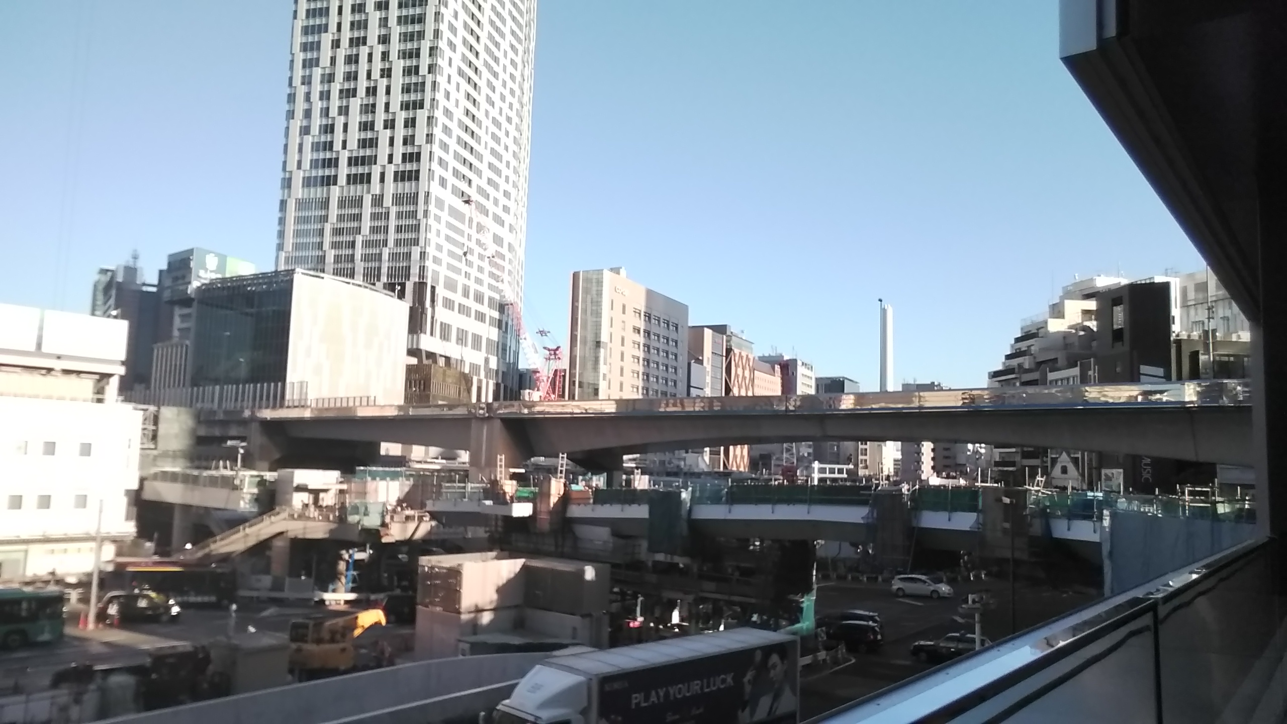 首都高速3号渋谷線 渋谷高架橋。渋谷駅西口の東急プラザ渋谷のデッキより、2019年11月撮影。